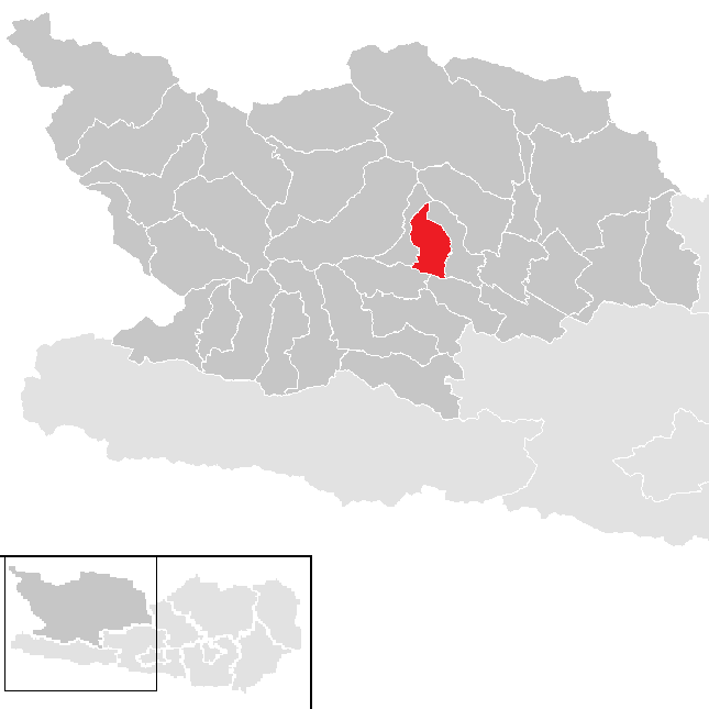 Bezirk Spittal an der Drau